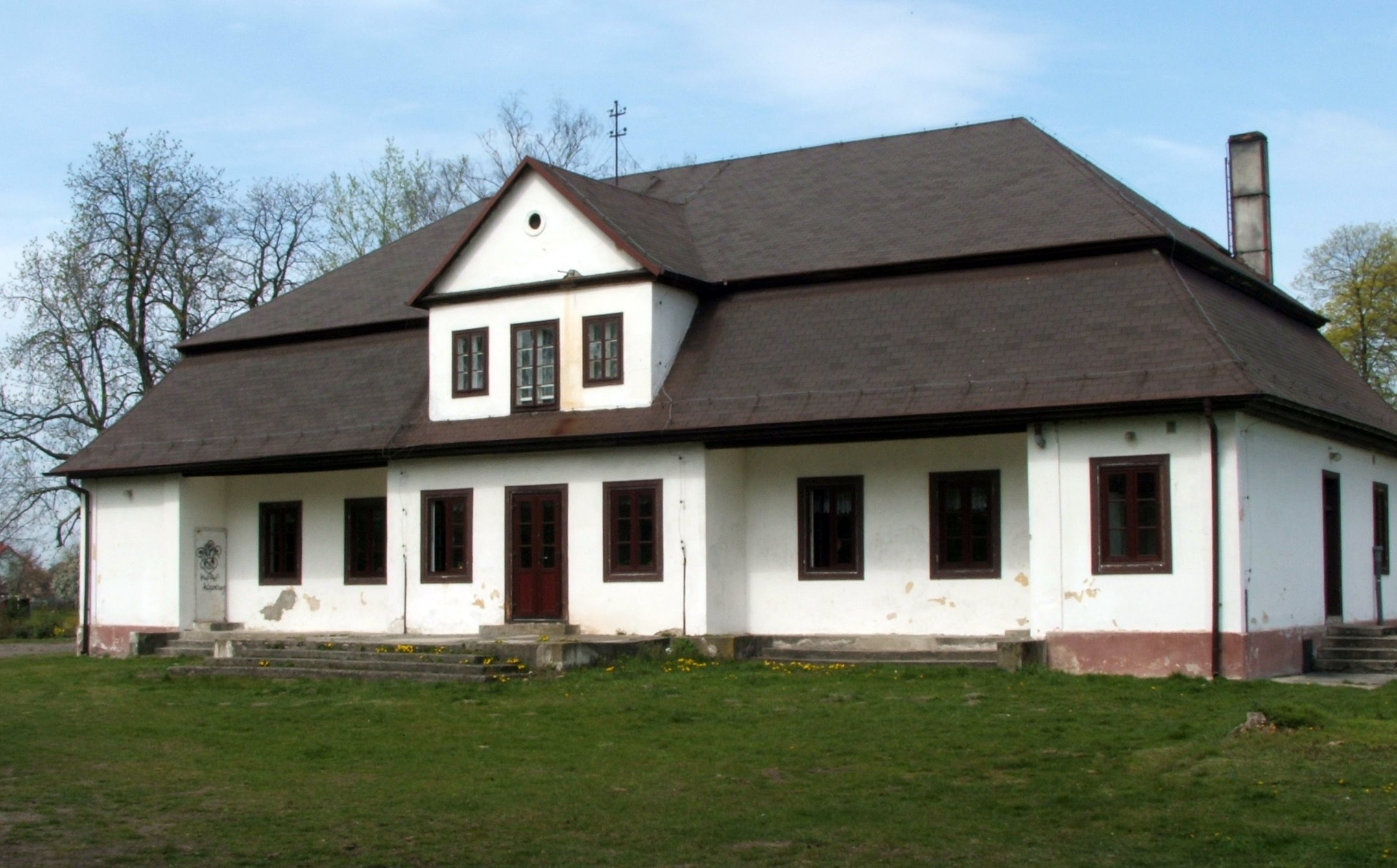 Permission: "Wykorzystanie tych zdjęć zostawiam do Pana wyboru, ja oświadczam, że zrzekam się do nich wszelkich praw." (The usage of these photos is up to you, I state that I release all the rights.)